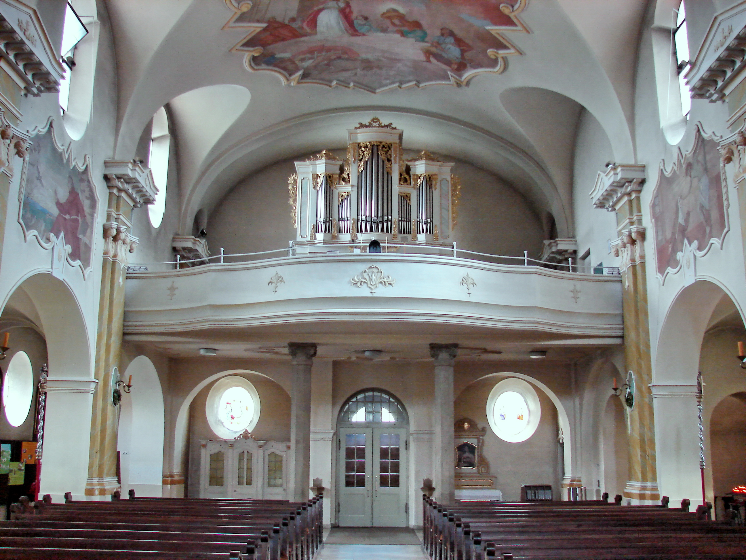 Katholische Stadtpfarrkirche Mariä Unbefleckte Empfängnis in Vohenstrauß.